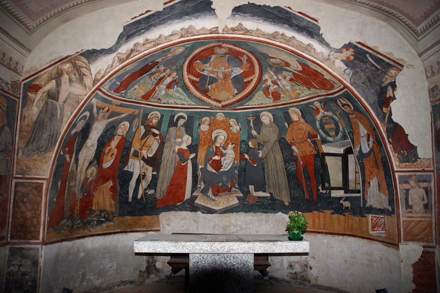 Affresco dell'abside nel Santuario della Madonna del Latte di Gionzana (Novara)